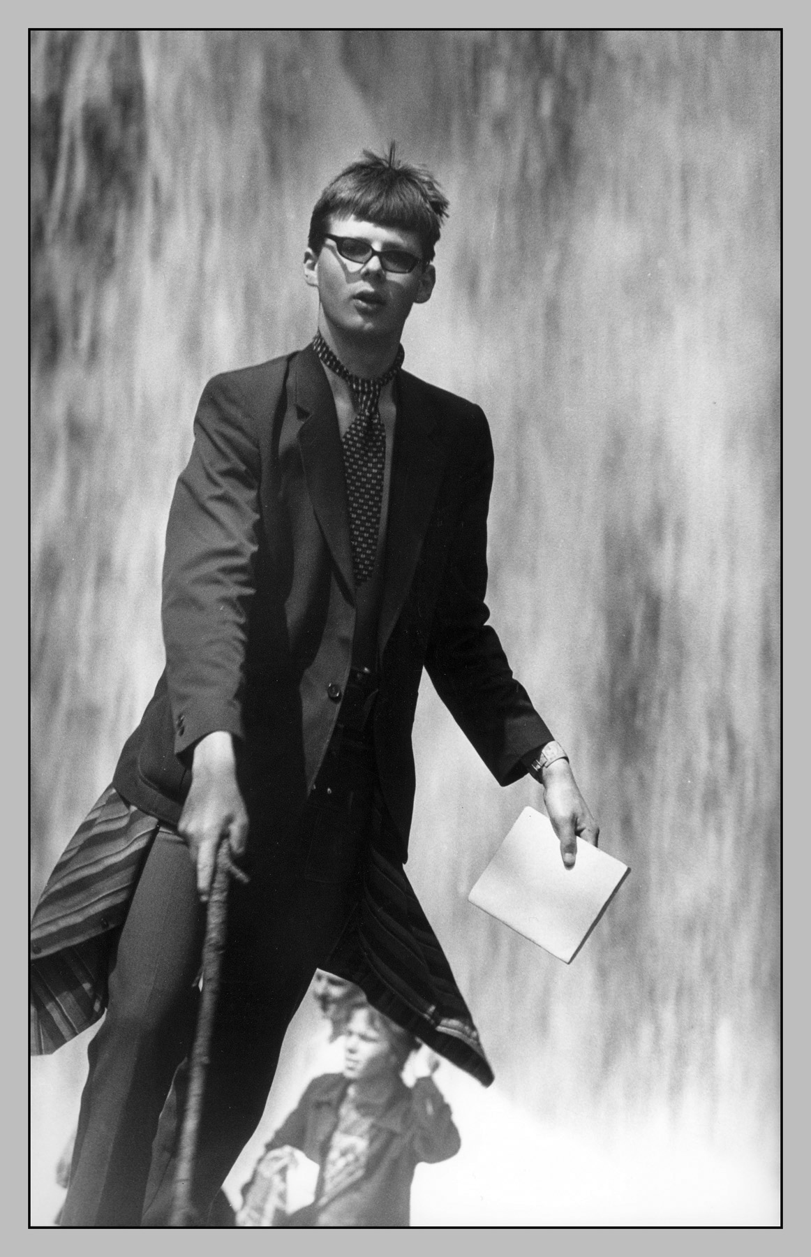 "Tormide, tungide aastad" – meenutades Kristjan Jaak Petersoni